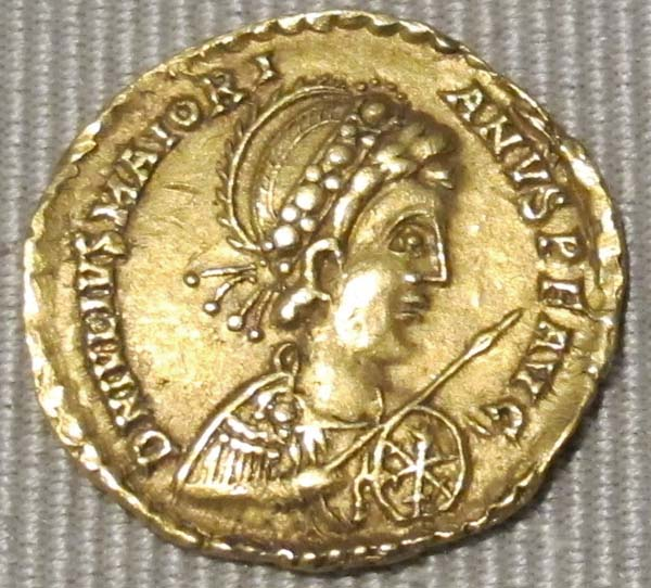 Impero d'occidente, maggioriano, solido in oro (arles), 457-461